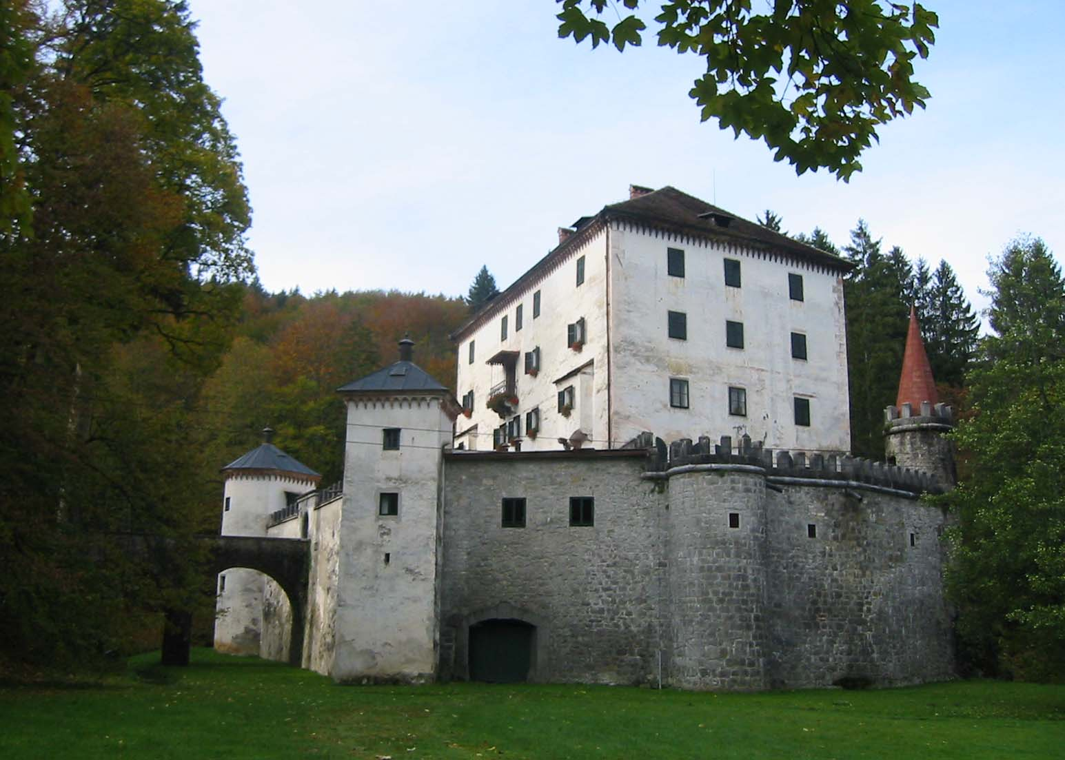 "Snežnik" castle in Slovenia photo:Ziga 10:39, 16 April 2007 (UTC)